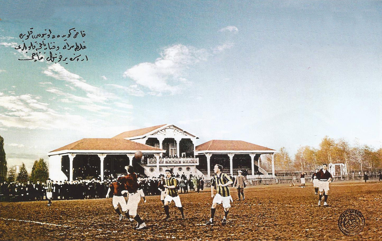 Kadıköy'de Union Club'da Galatasaray ile Fenerbahçe arasında bir futbol maçı.